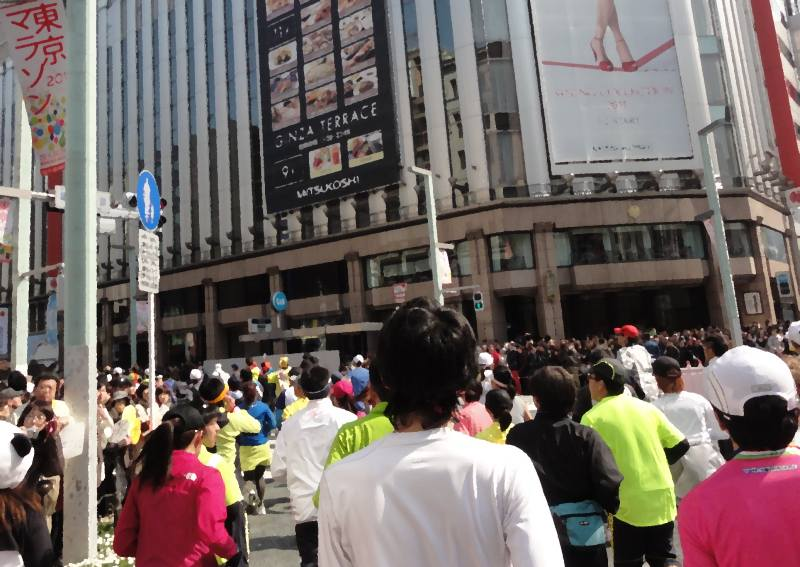 tokyo marathon 2011 ginza